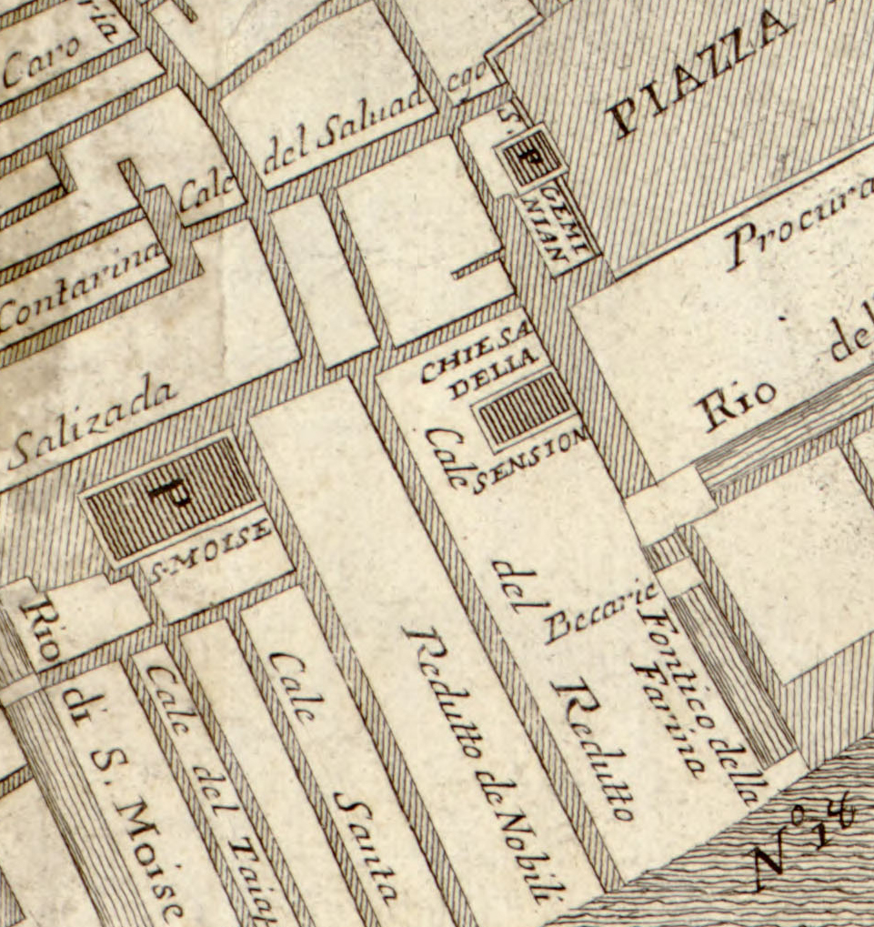 Posizione della chiesa di Santa Maria in Broglio nella mappa di Ughi